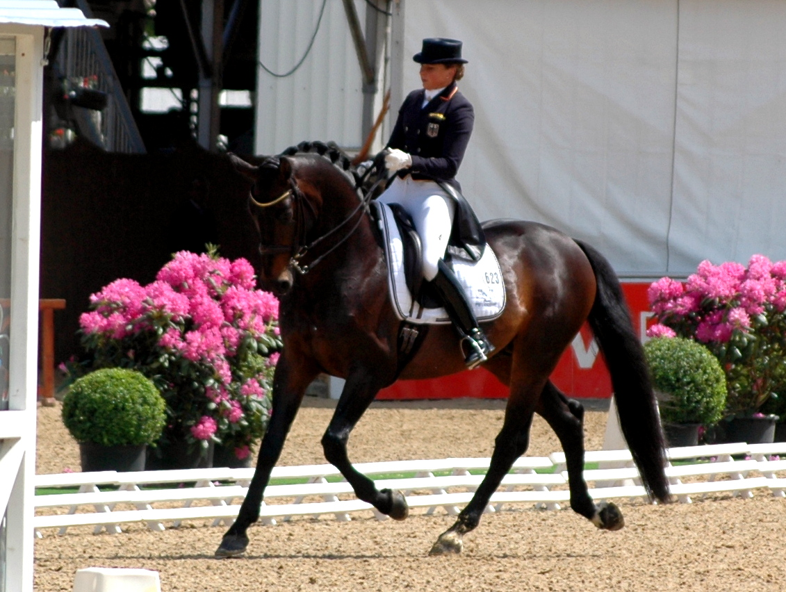 51. Maimarkt-Turnier: Dorothee Schneider mit Silvano